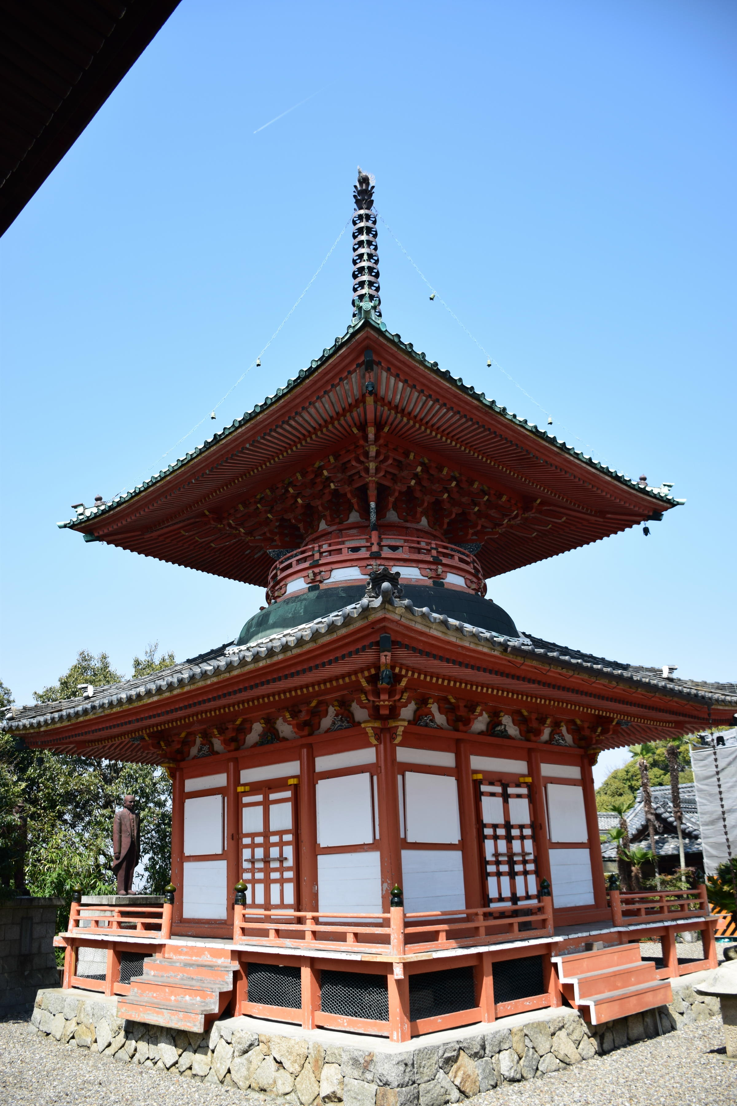 龍泉寺多宝塔